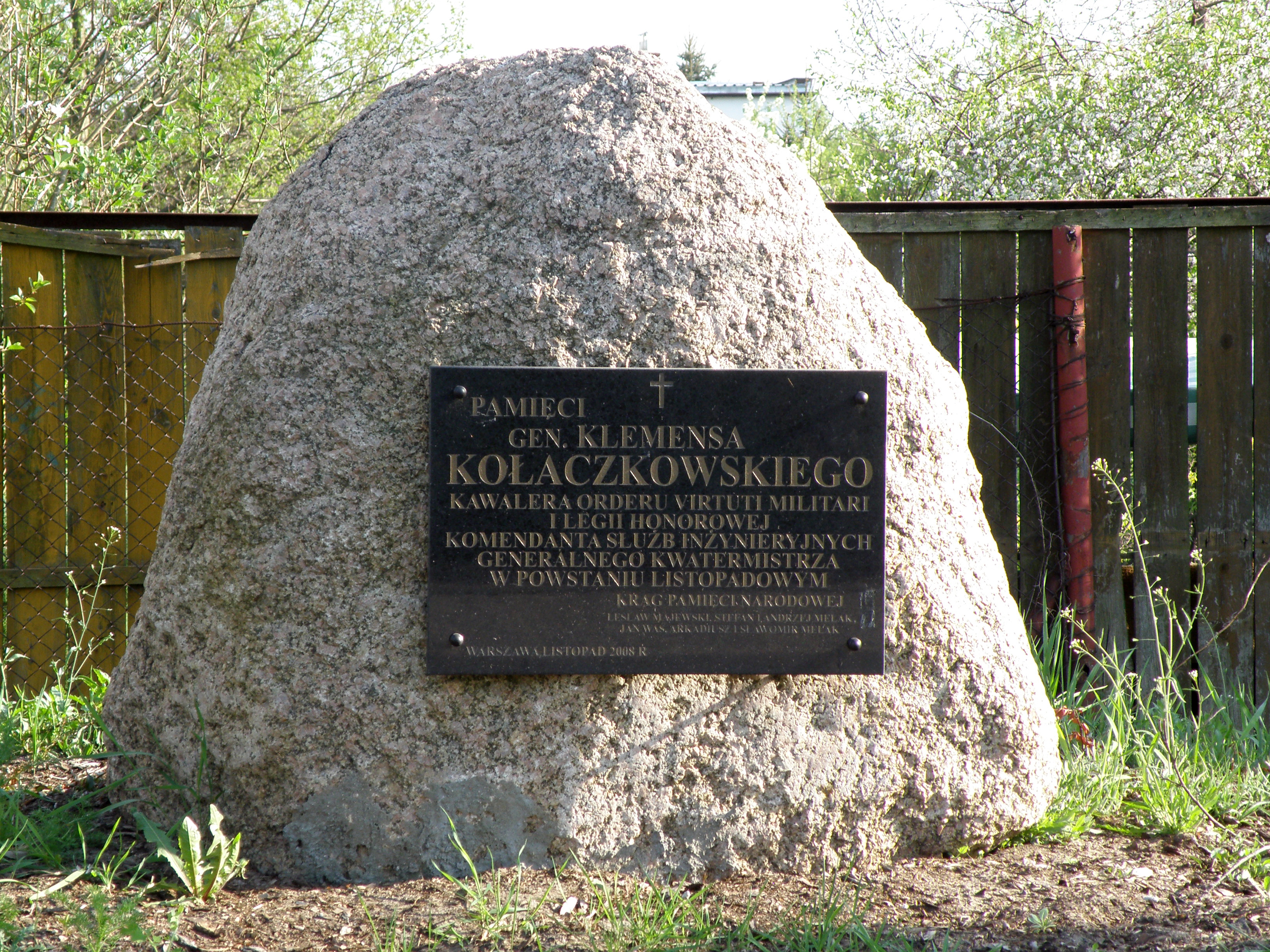 Olszynka Grochowska - Aleja Chwały, ul. Traczy